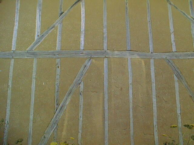 Façade d'une maison à pans de bois et torchis du Porcien. Cliché personnel?